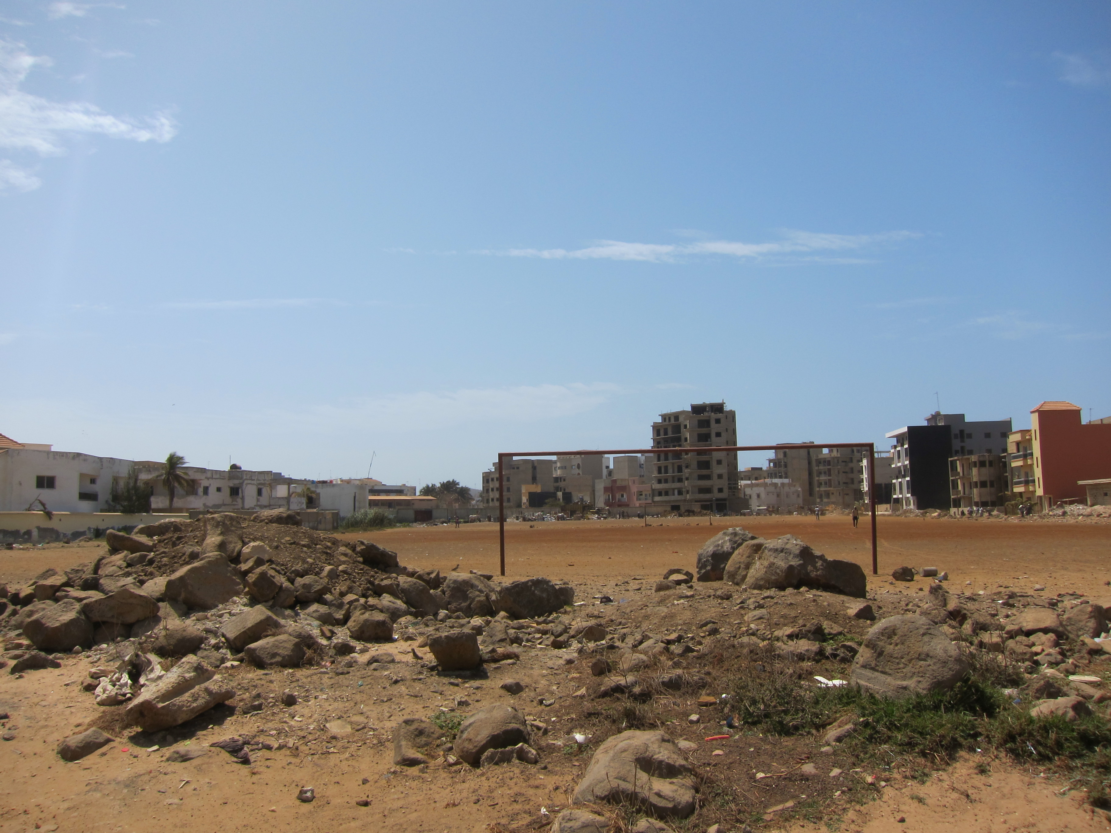 Стадион в деревне Нгор